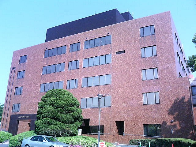 大野城市役所 2006年5月に投稿者(Muyo master)自身が撮影 Category:福岡県の官公庁画像 Template:City Hall, Onojo, Japan